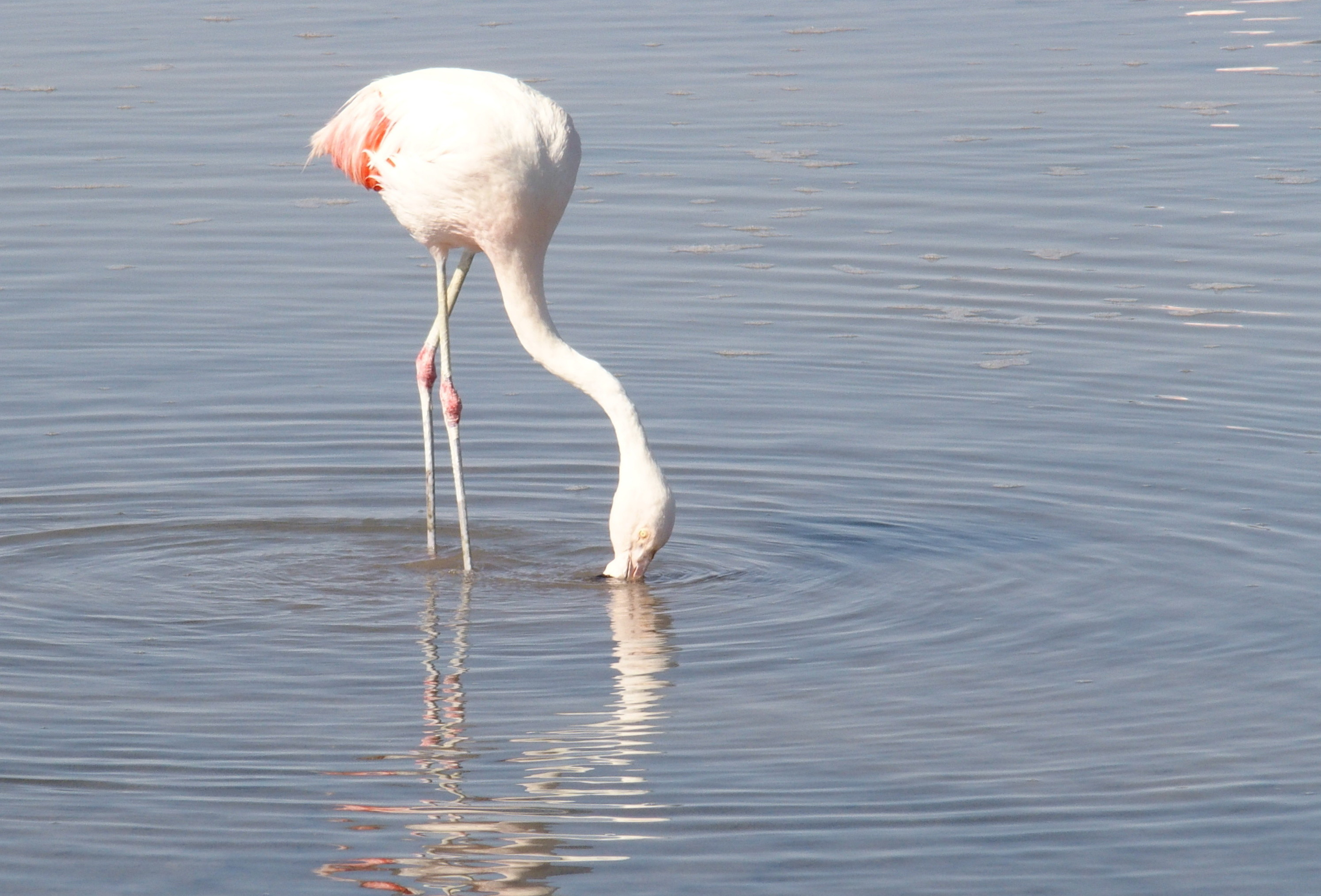 Chileflamingo (Phoenicopterus chilensis)